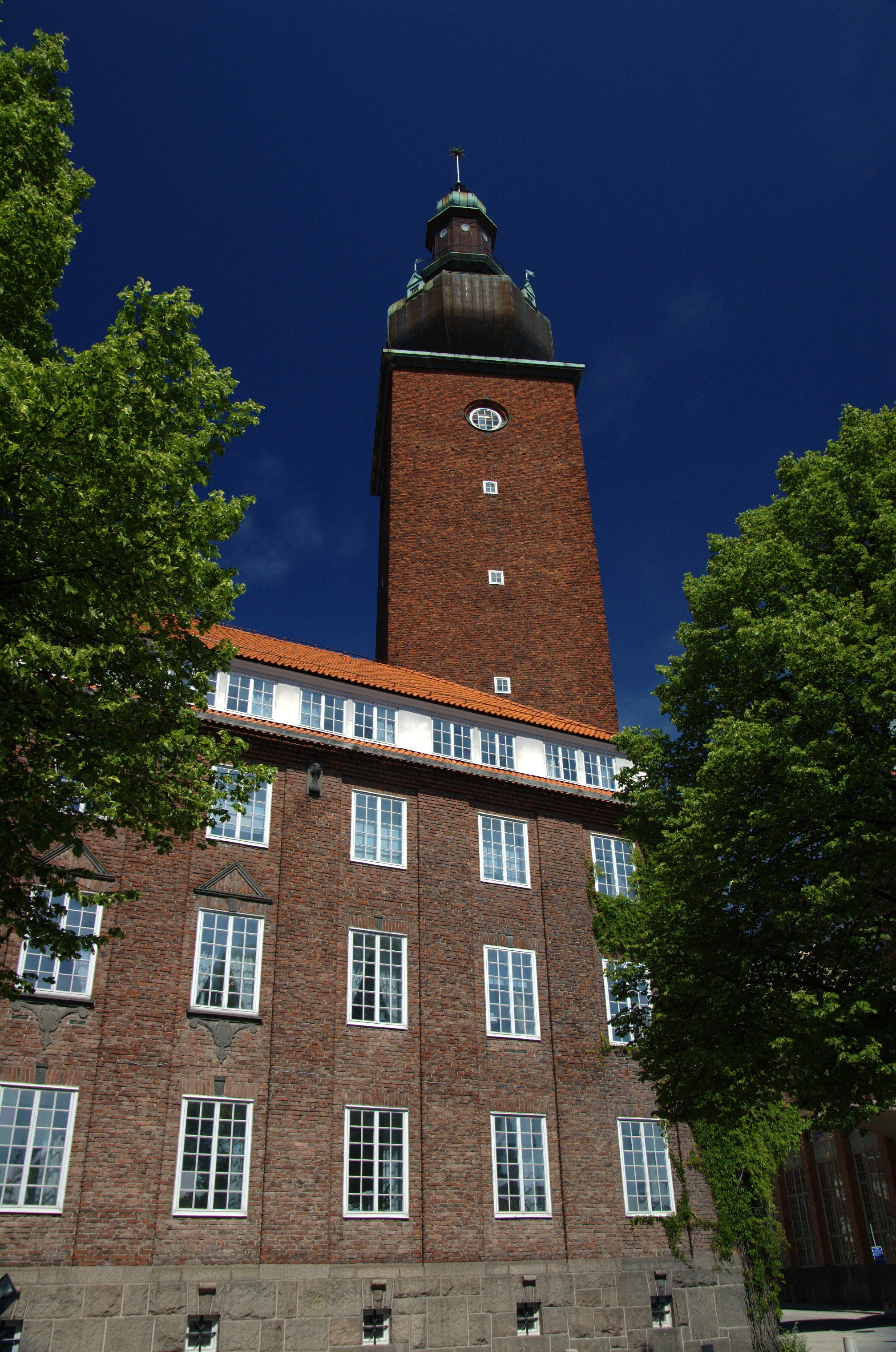 ABB headquarter Sweden, Västerås